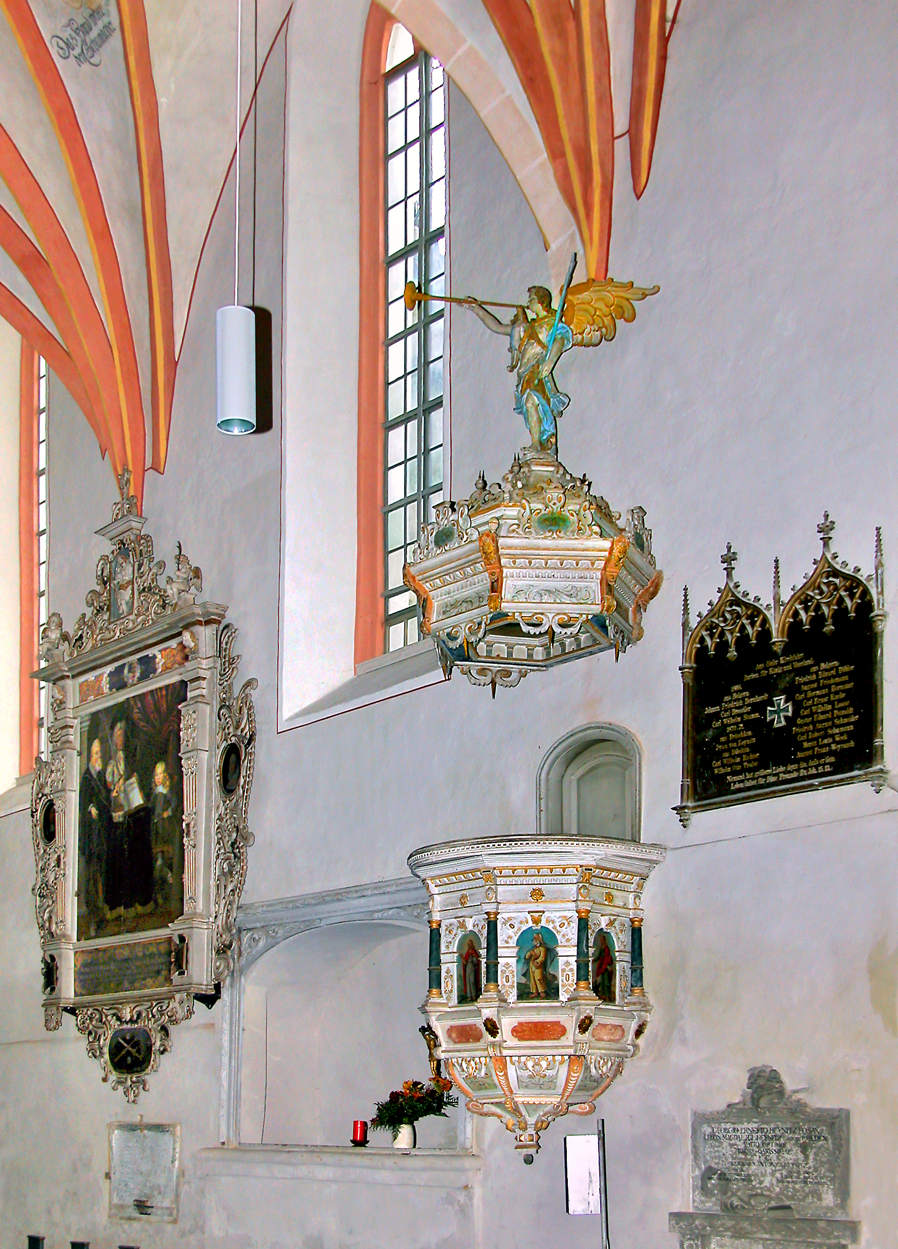 10.04.2009 04874 Belgern (Belgern-Schildau), Kirchgasse (GMP: 51.484091,13.127551: St. Bartolomäus Kirche. 1267 erstmals erwähnt, erhielt die St. Bartholomäus Kirche 1509 bis 1512 ihre heutige Gestalt. [DSCN36234.TIF]20090410720DR.JPG(c)Blobelt